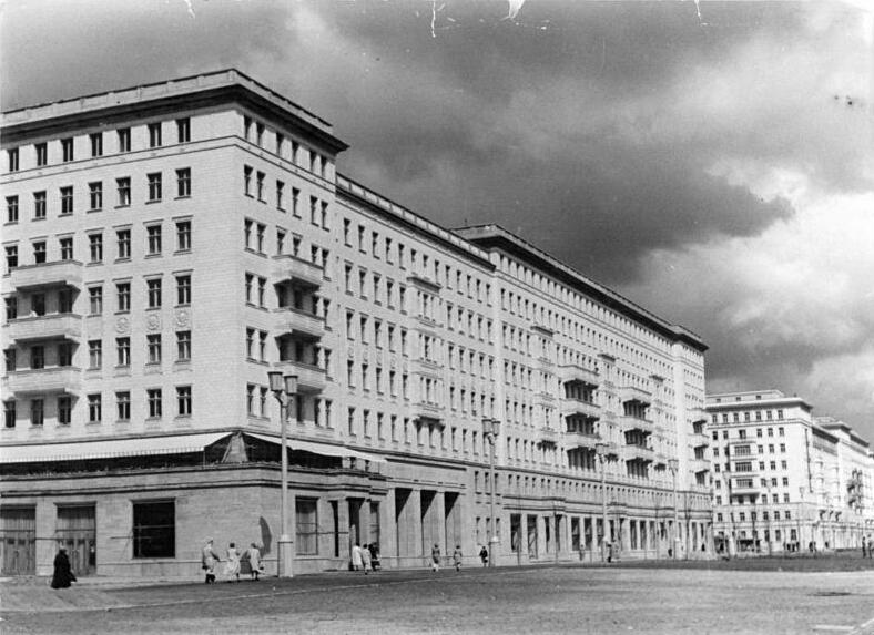 Zentralbild Weiß 29.7.1953 Cafe "Warschau" in der Stalinallee in Berlin Block D-Nord, erbaut nach den Entwürfen des Nationalpreisträgers und Chefarchitekten Kurt Leucht. In diesem Block ist das HO-Cafe "Warschau".